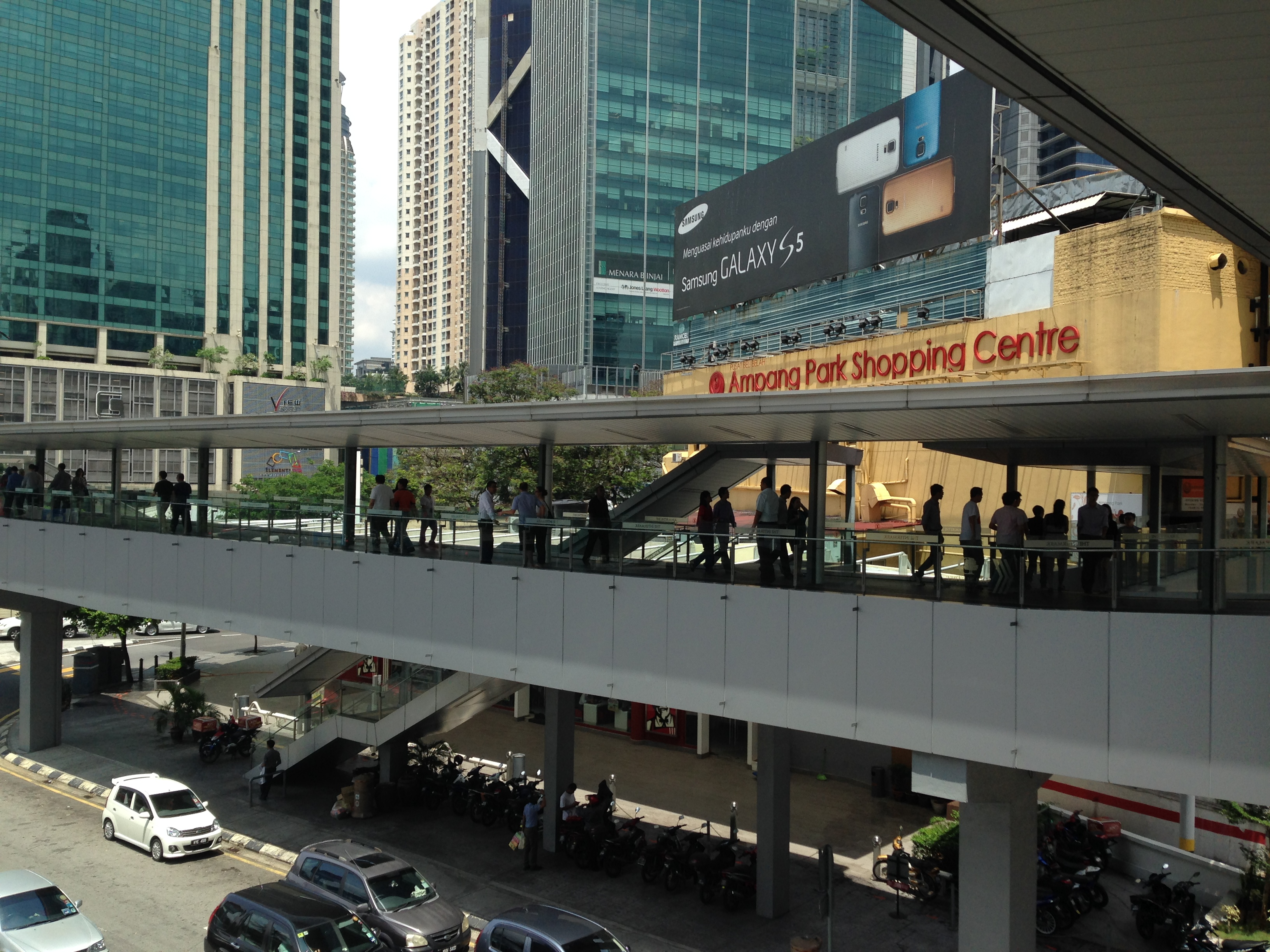 Jalan Tun Razak Skybridge